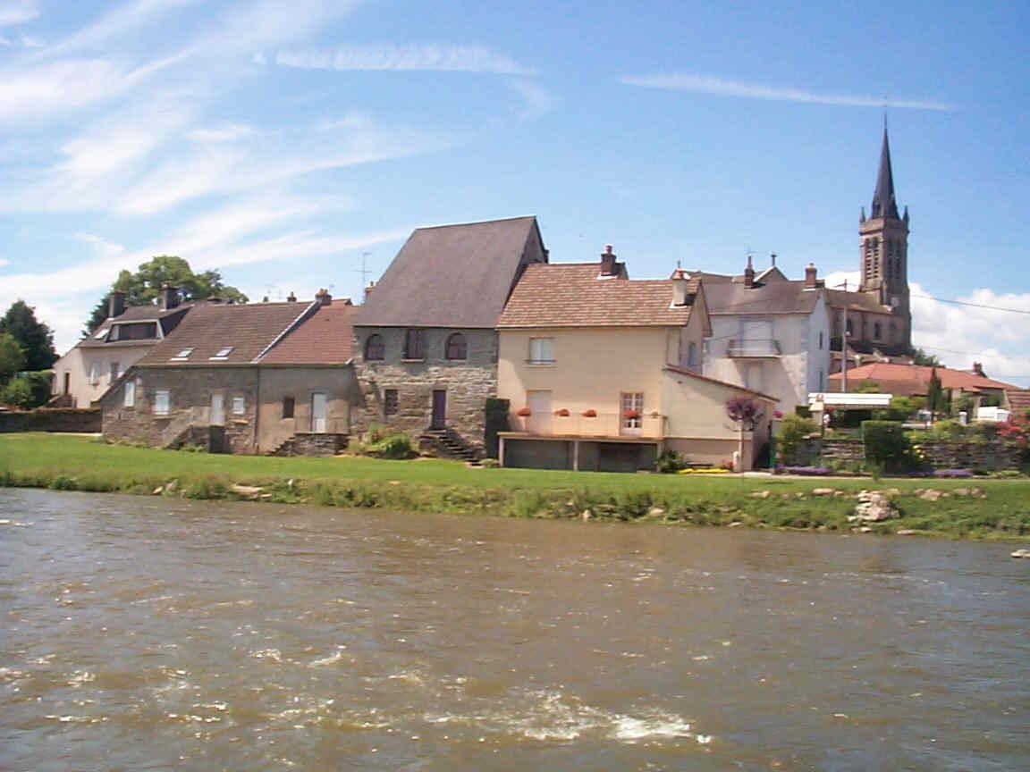 Vue sur a Maison du Passeur